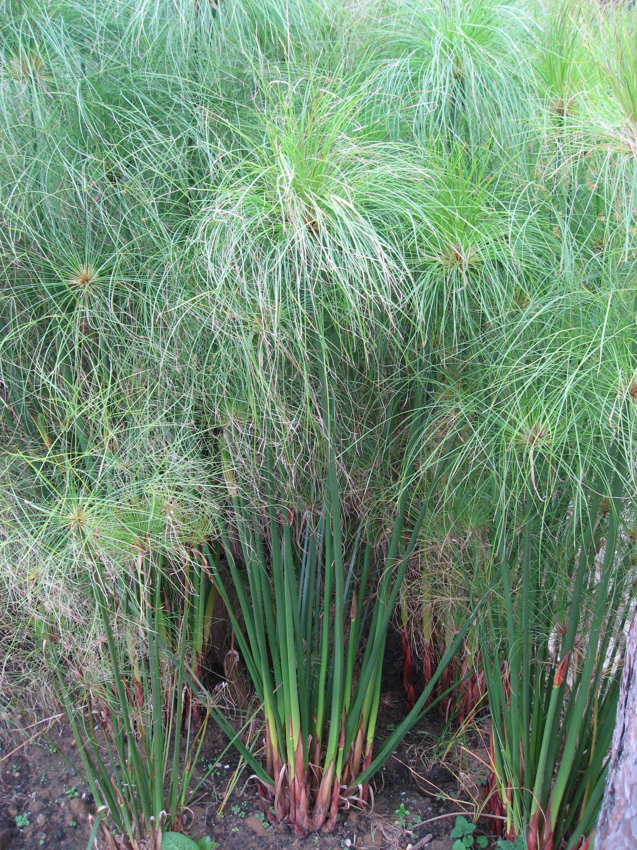 Cyperus papyrus in Parc floral de Paris Map: 48° 50' 19" N 2° 26' 33" E